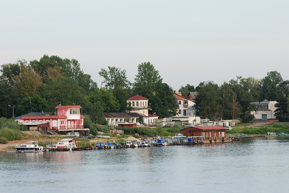 Přístav ve Velikém Novgorodu v Rusku